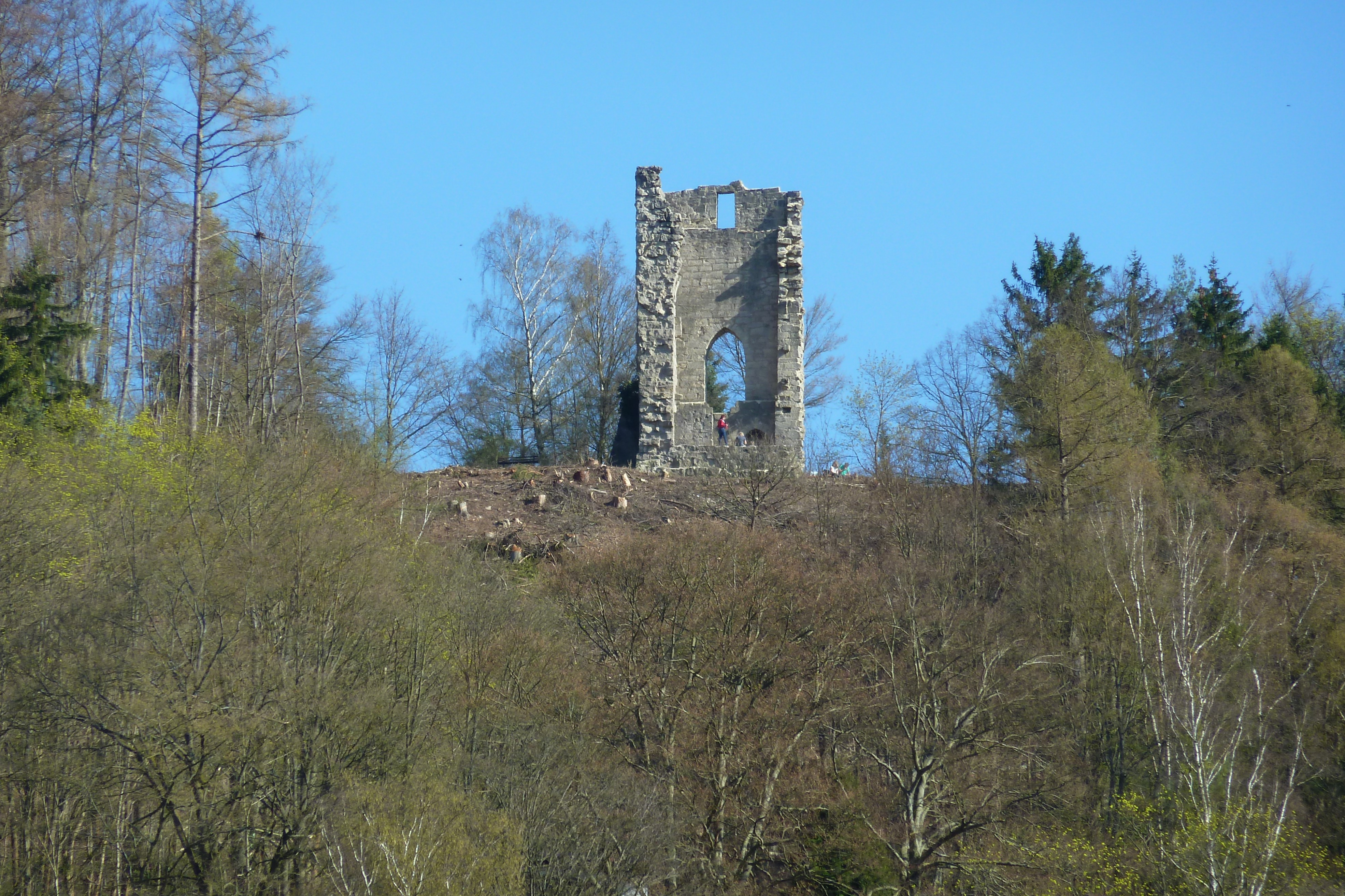 Ruine eines neugotischen Wohnturms auf der Donopskuppe in Meiningen, erbaut 1822, teilweise eingestürzt 1882.